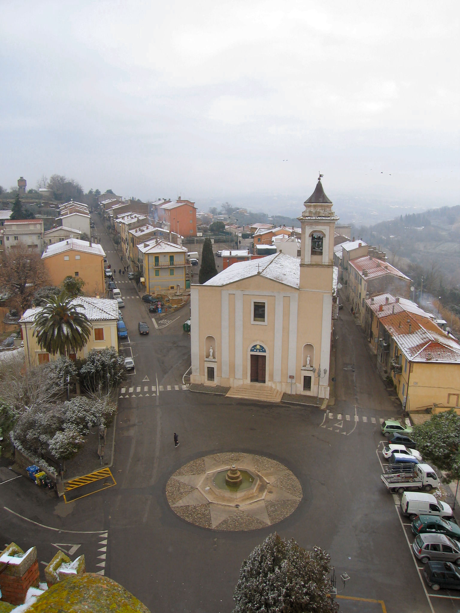 Chiesa dei Santi Cosma e Damiano a Stimigliano, provincia di Rieti.